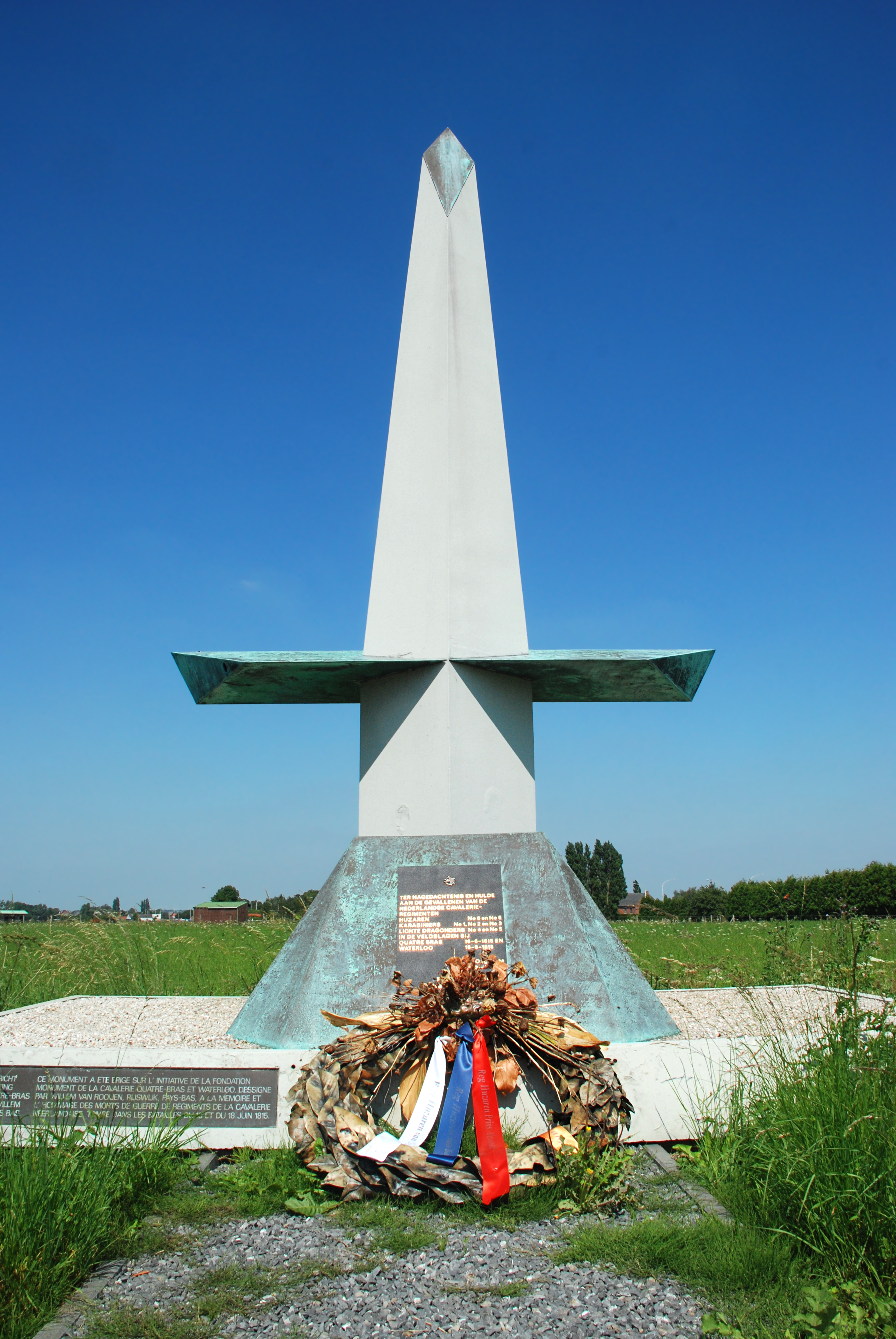 Belgique - Genappe - Quatre Bras de Baisy-Thy - Monument à la cavalerie néerlandaise This photo of immovable heritage has been taken in the Walloon Region